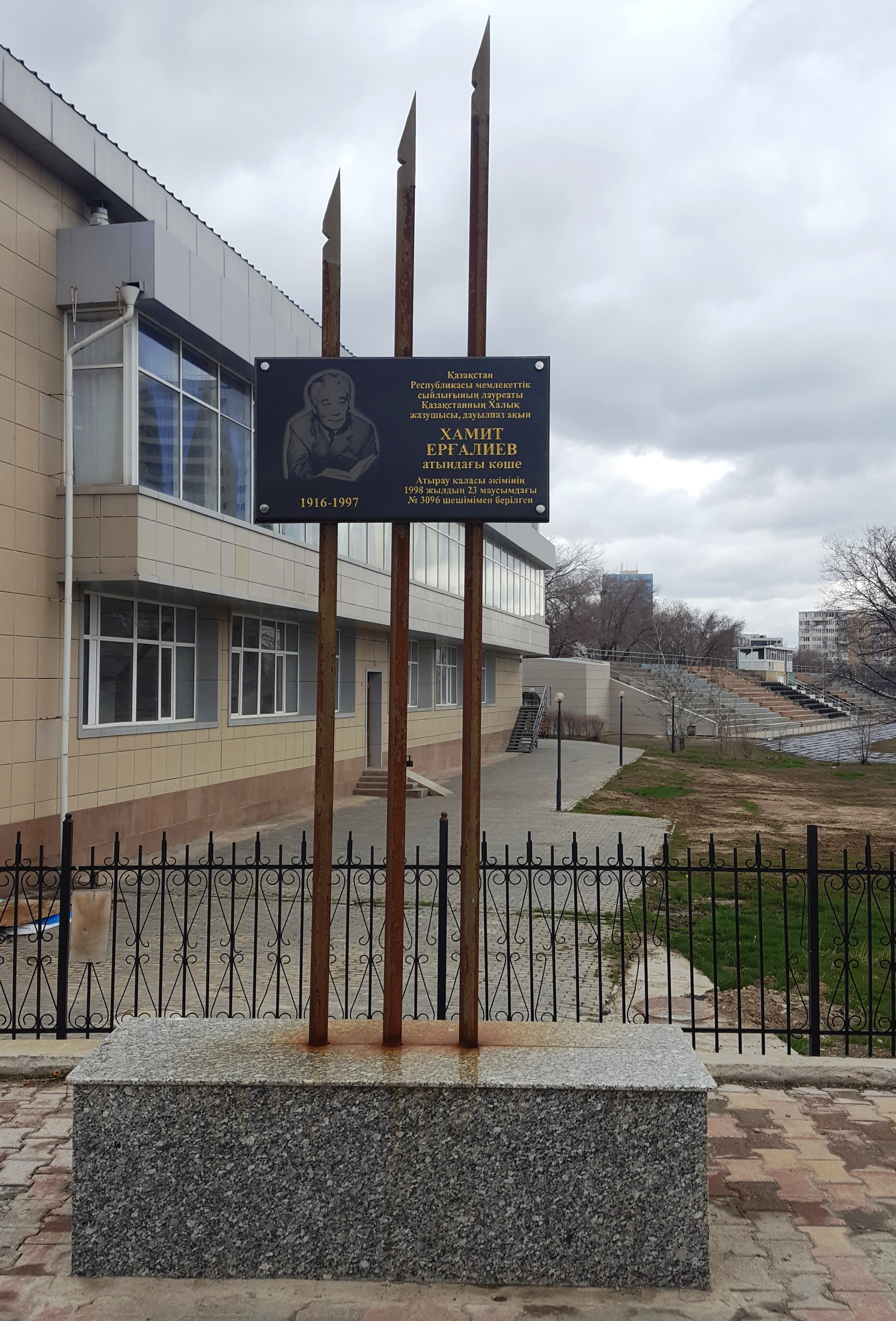 Қазақша (кирил): Атыраудағы Хамит Ерғалиев тақтасы